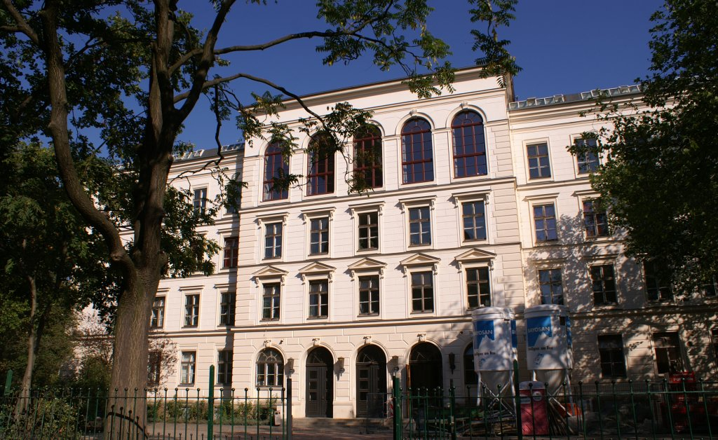 Evangelisches Schulzentrum in Leipzig, Frontansicht